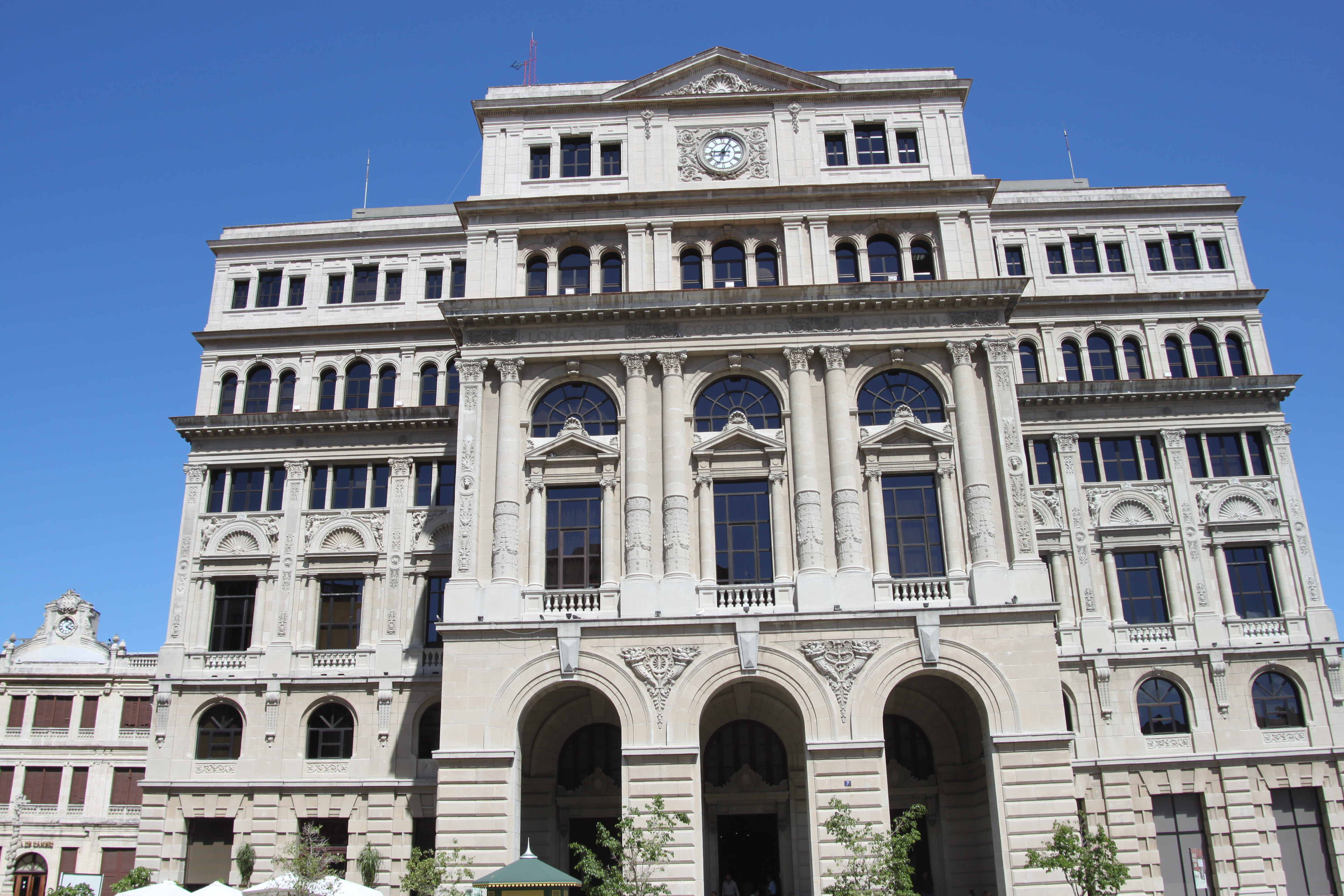 La lonja del Comercio